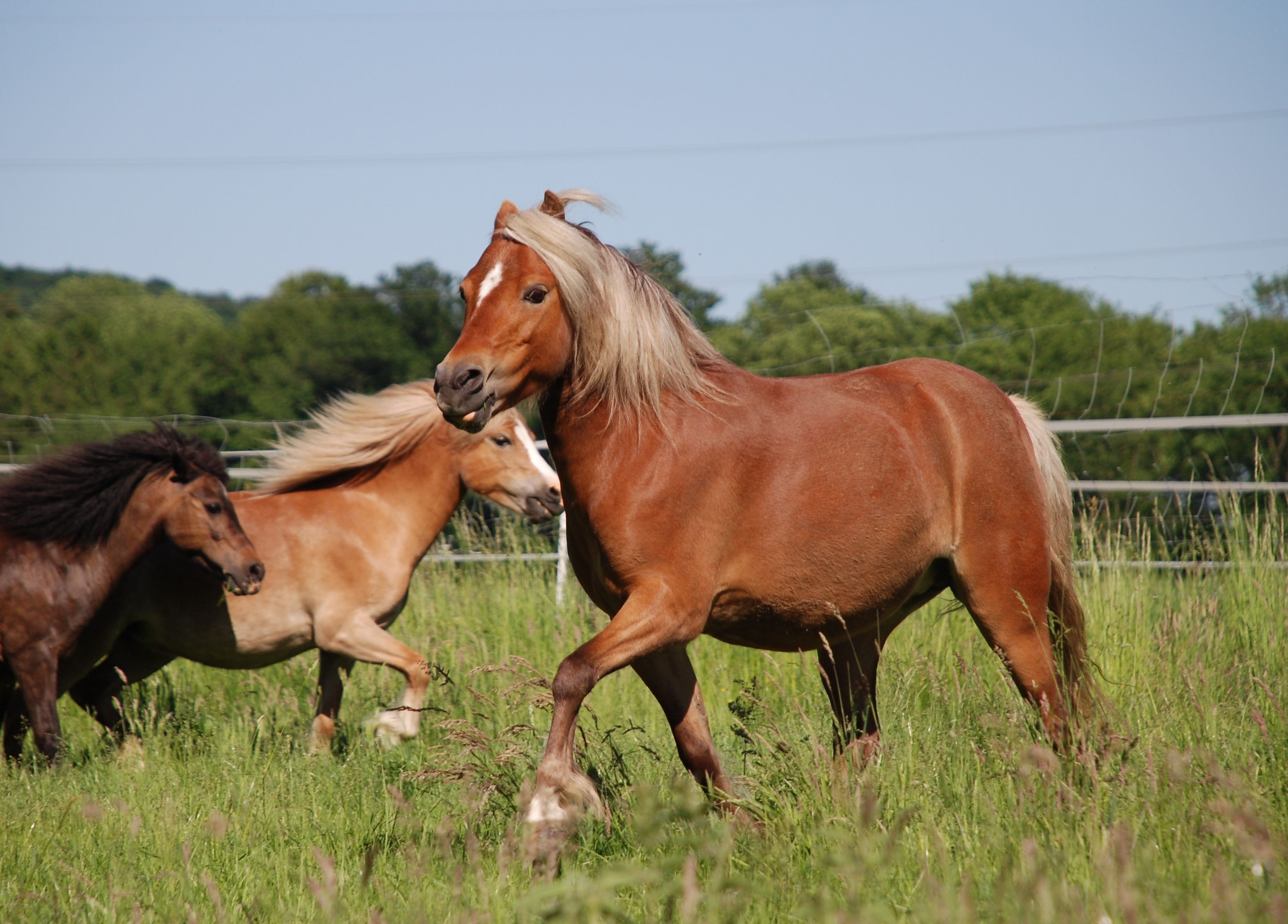 3 Classic Ponies verschiedener Farben